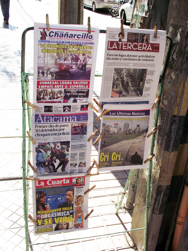 Portadas de diarios regionales ("Atacama" y "Chañarcillo") y nacionales ("La Tercera", "Las Últimas Noticias" y "La Cuarta") en un quiosco de Copiapó (Región de Atacama) el día 25 de agosto de 2011.